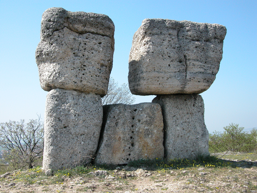 Skulptur von Rolf Jörres, (umgesetzt nach Pöttsching), Symposion Europäischer Bildhauer, St.Margarethen, Burgenland, Austria mehr info auf